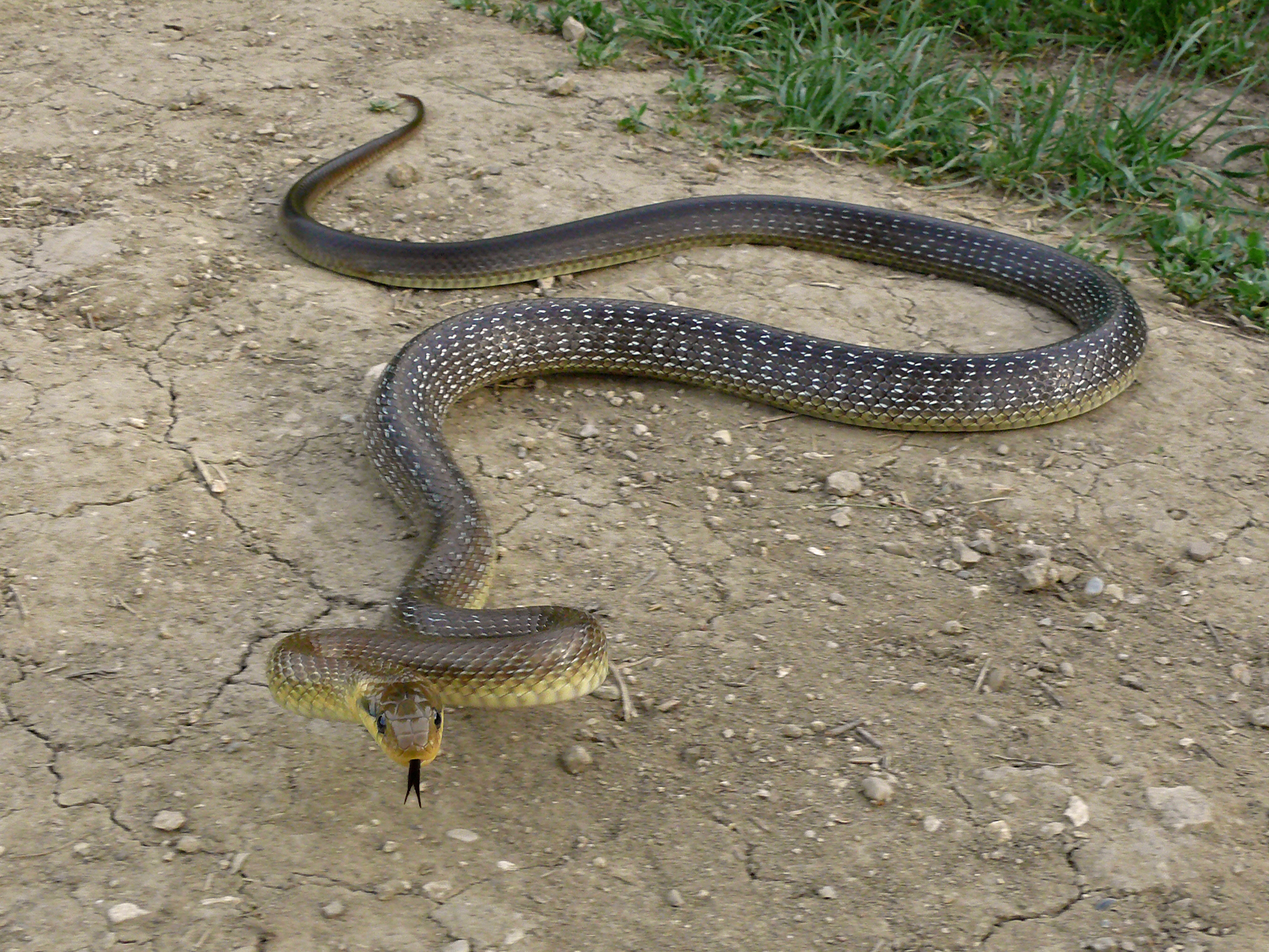 Eichkogel This media shows the nature reserve in Lower Austria with the ID 3.